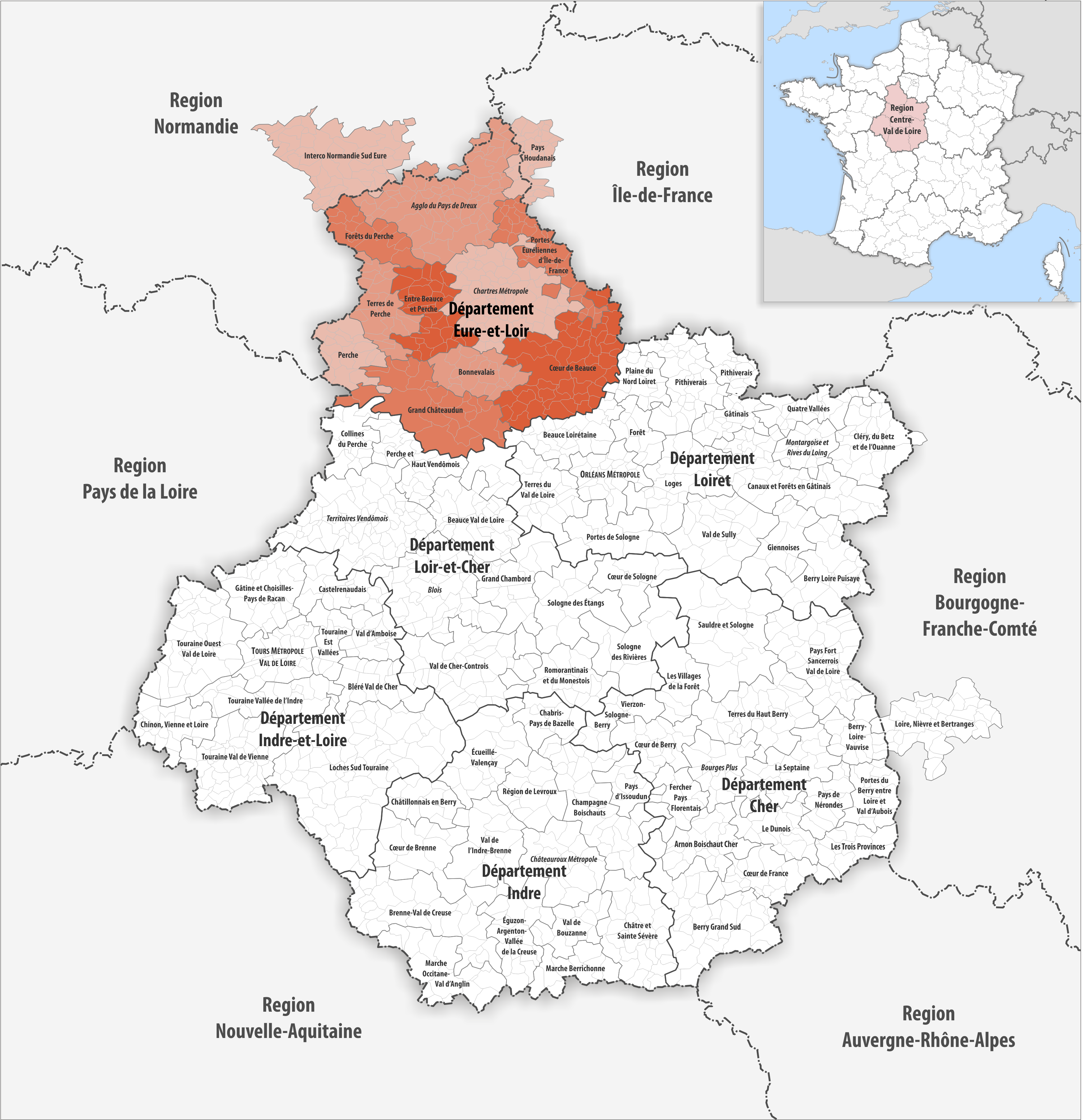 Gemeindeverbände im Département Eure-et-Loir